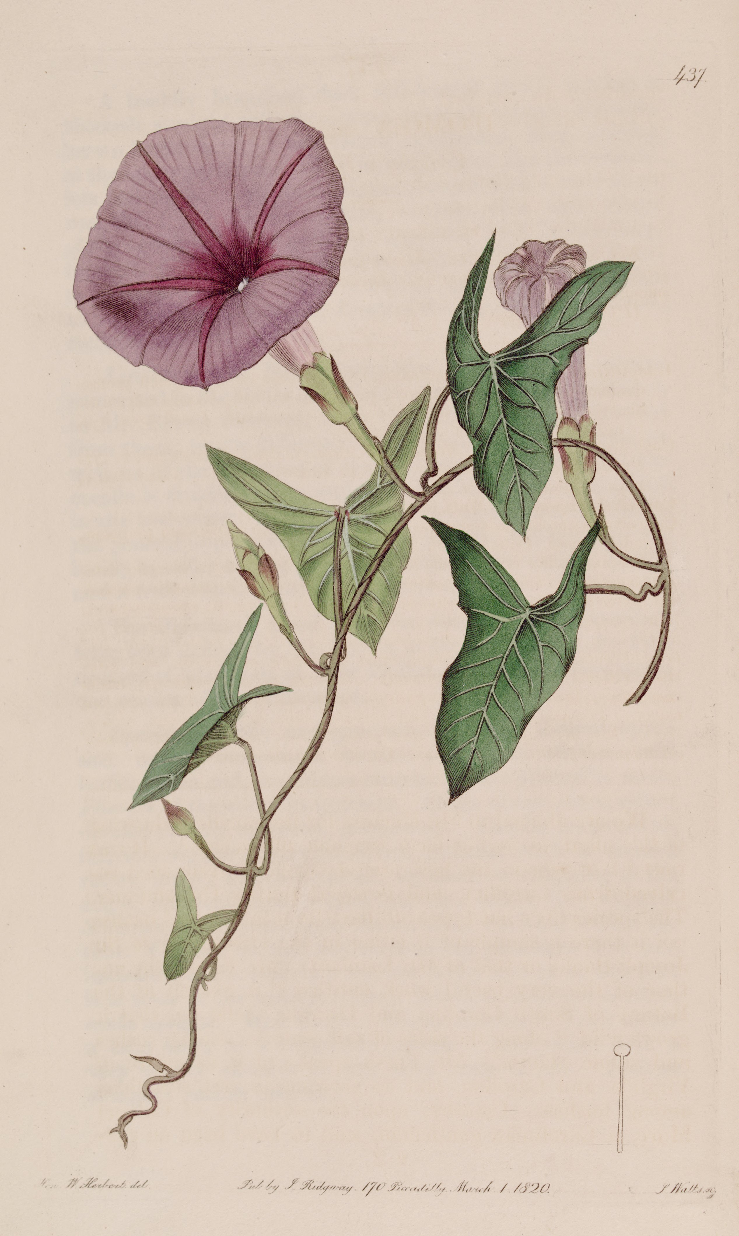 Ipomoea sagittata